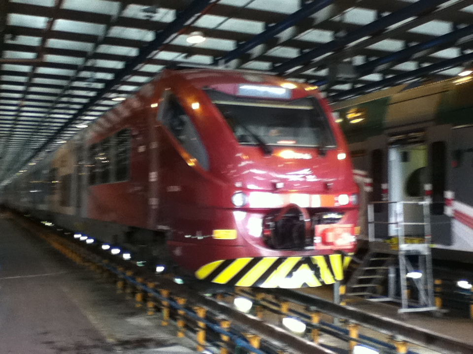 Il Convoglio Servizio Aeroportuale al deposito di Novate Milanese.